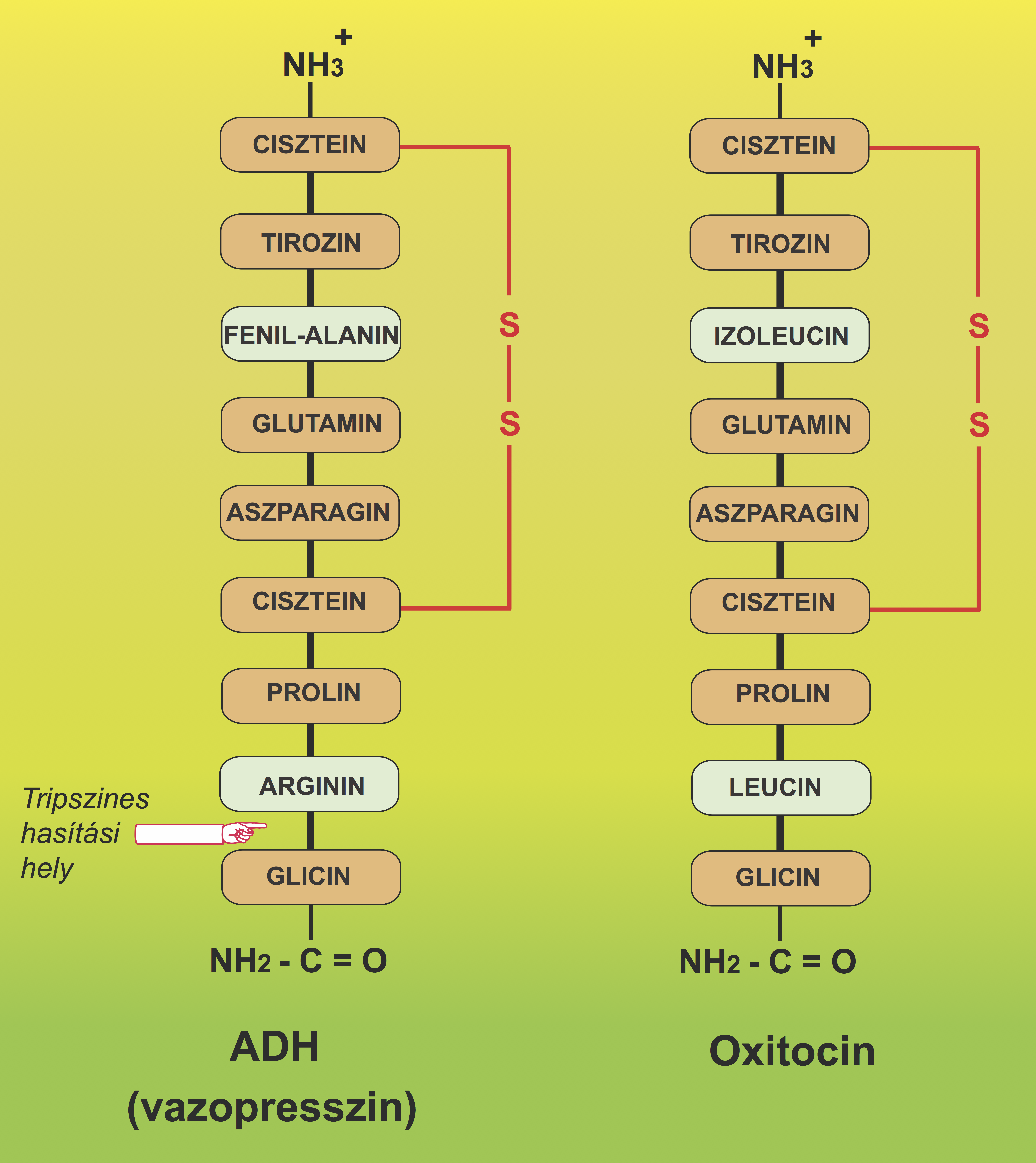 Vazopresszin és oxitocin szerkezetének vázlatos rajza